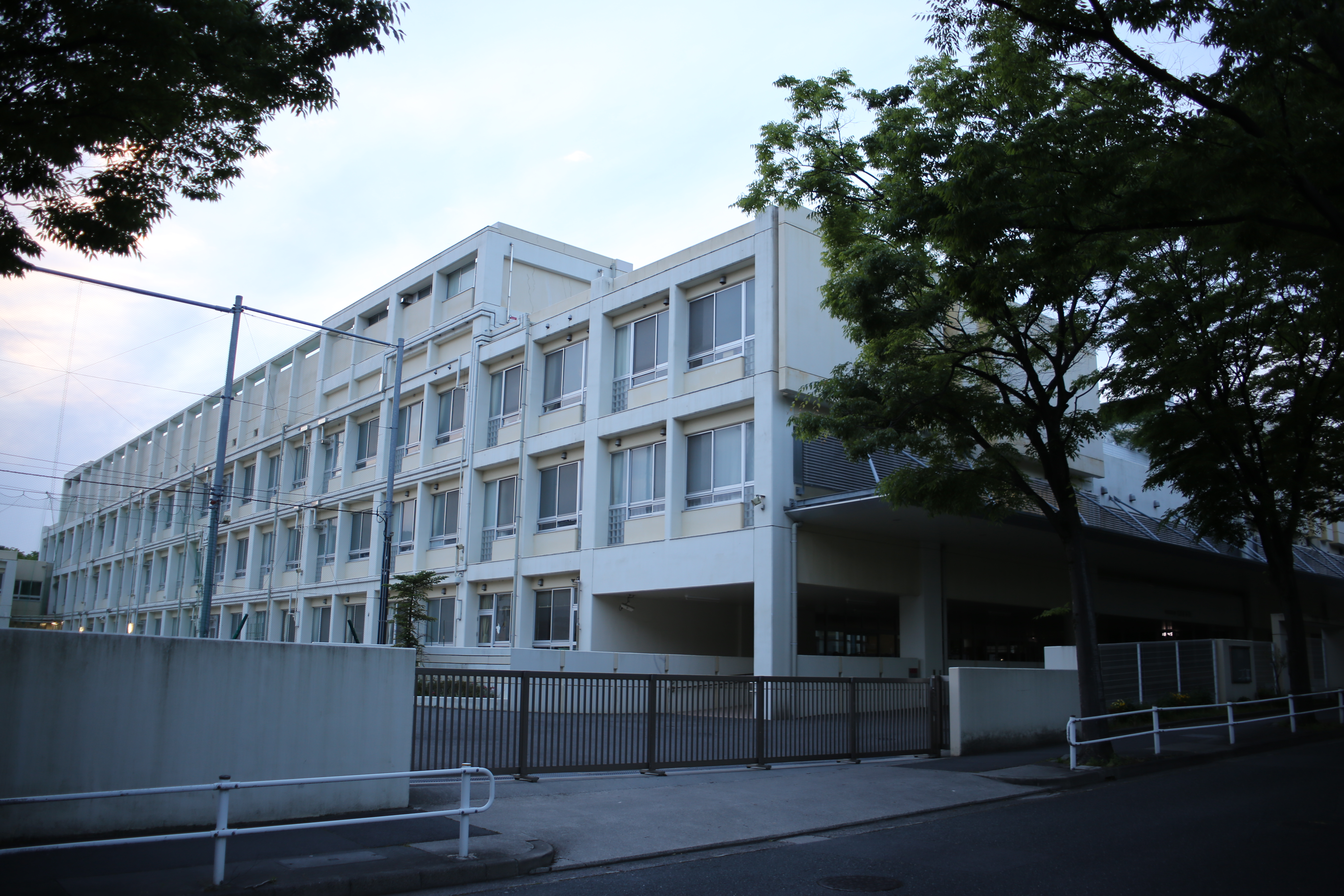 名古屋市熱田区三本松町の名古屋市立南養護学校を東側公道南側より撮影